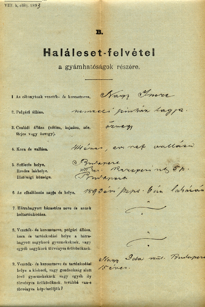 Nagy Imre haláleset felvételi lapja